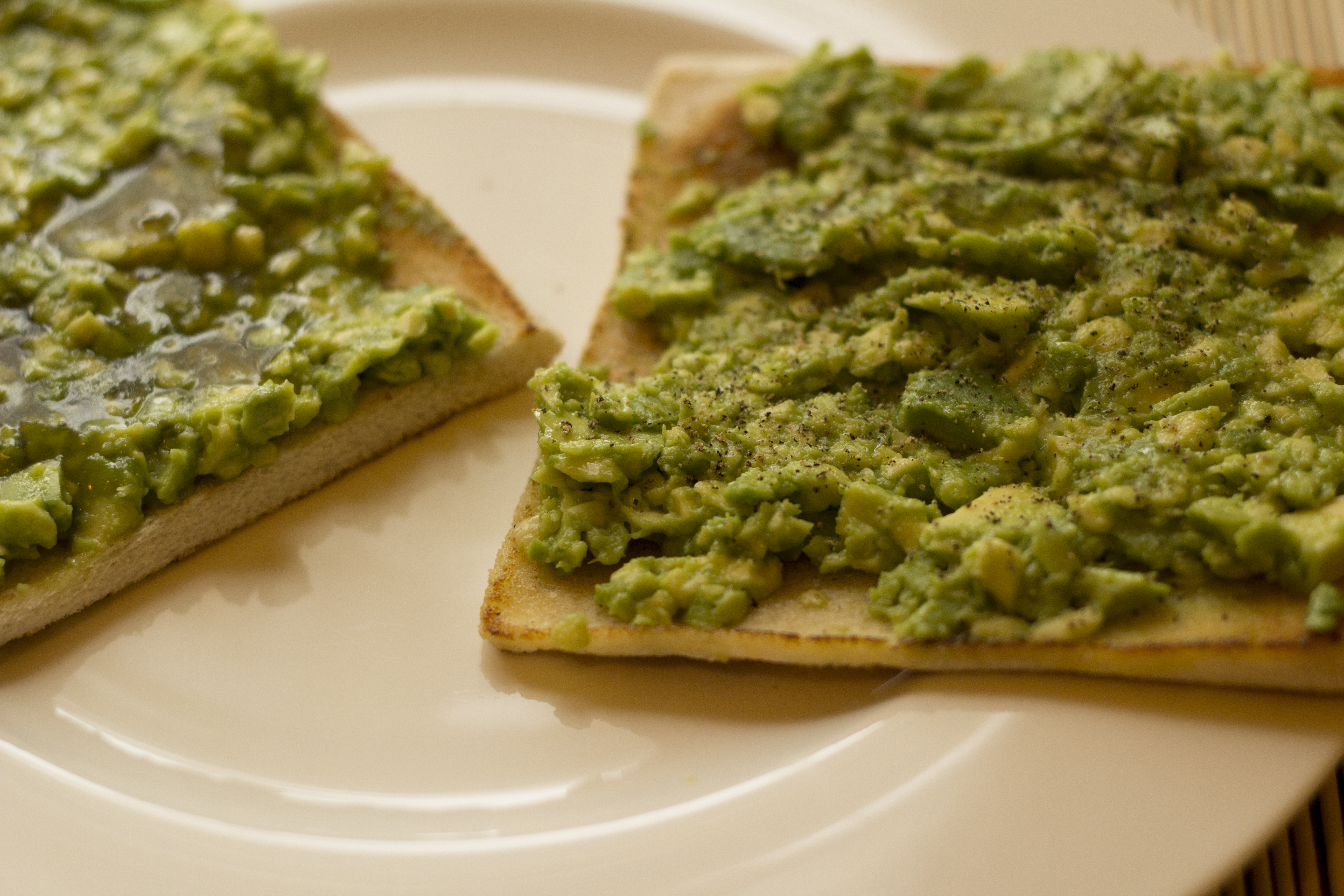 Avocado Toast (Recipe in italian: )